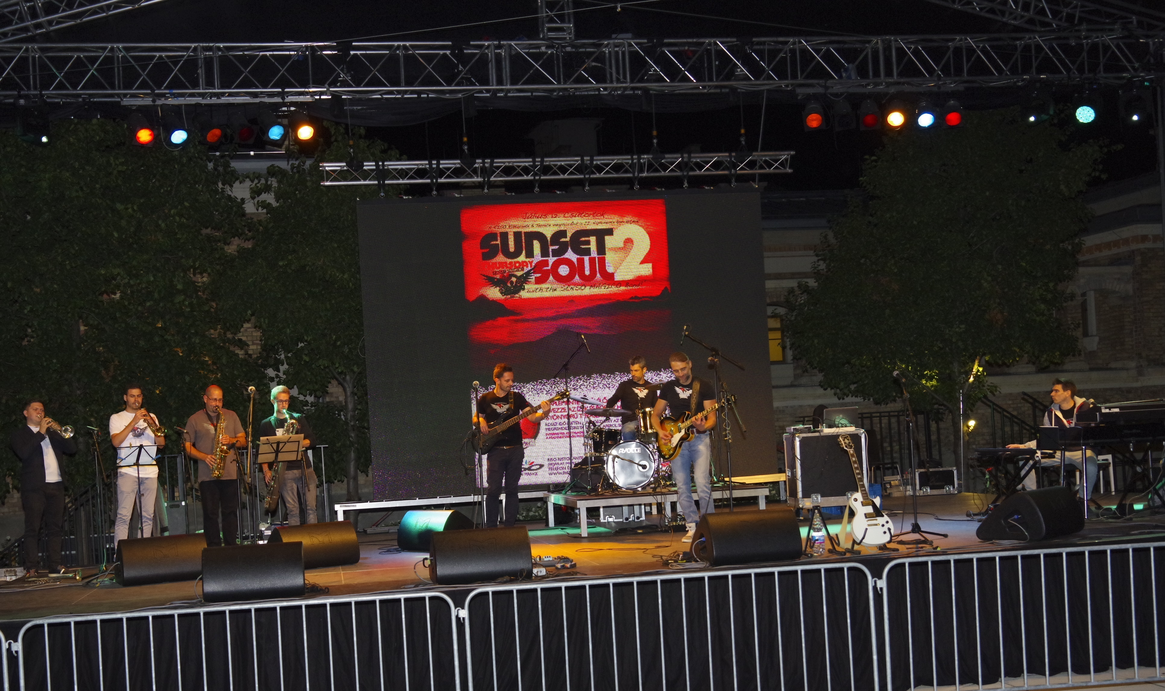 A Senso Magico 10.évi jubileumi koncertjén a Várkert Bazárban